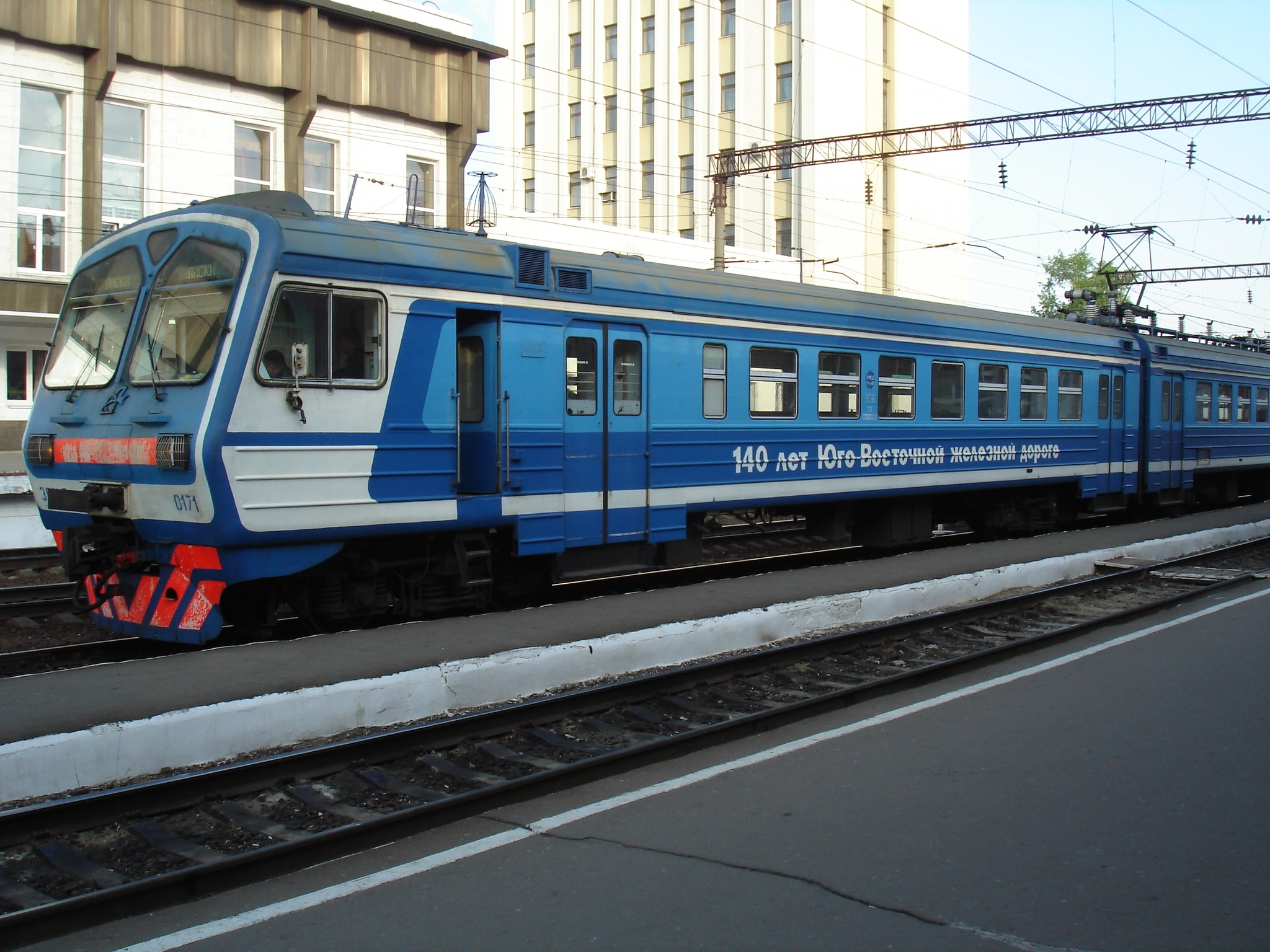 Электропоезд ЭД9М-0171 "140 лет ЮВЖД" на станции Лиски